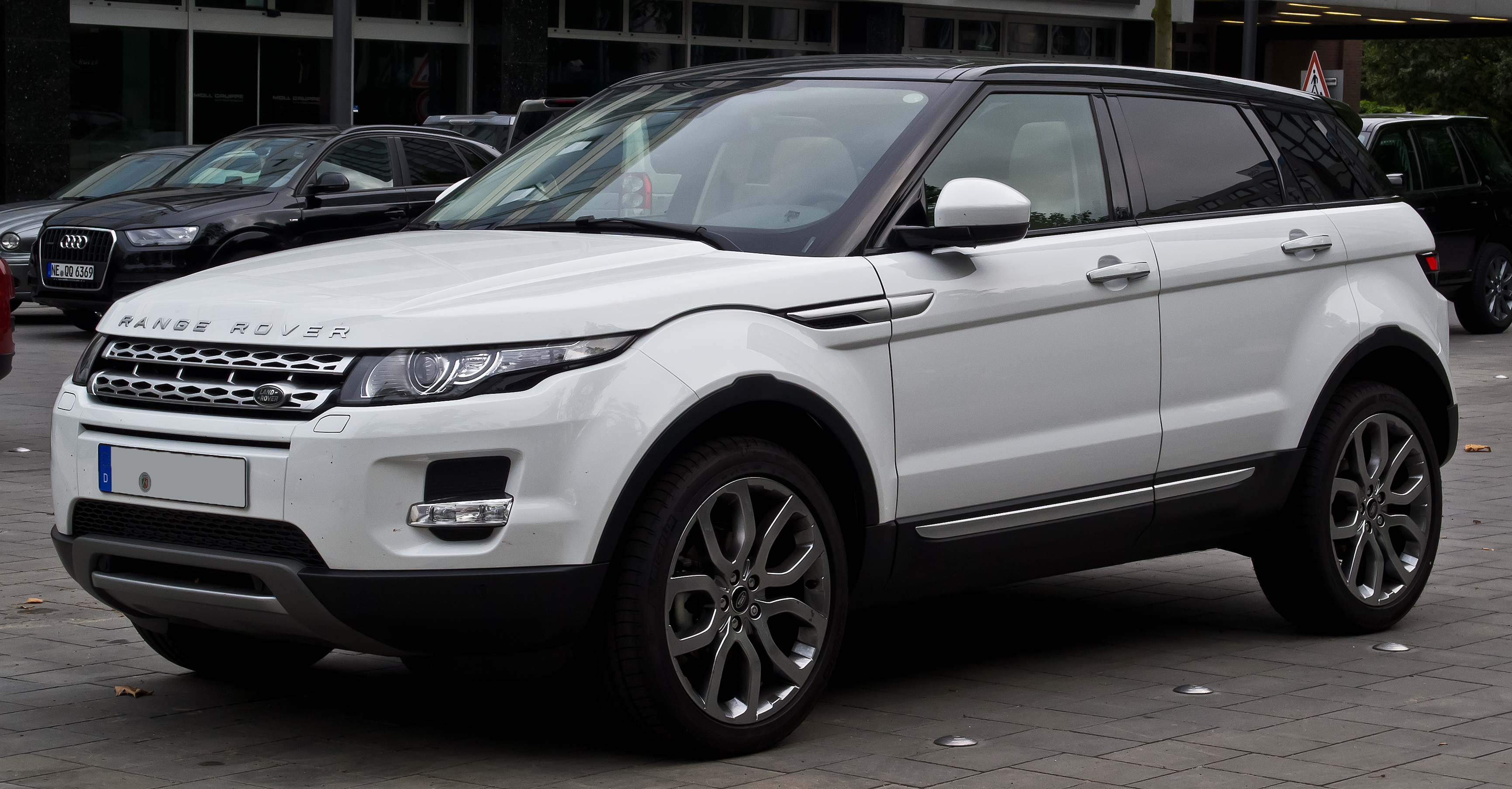 Range Rover Evoque SD4 4WD Prestige